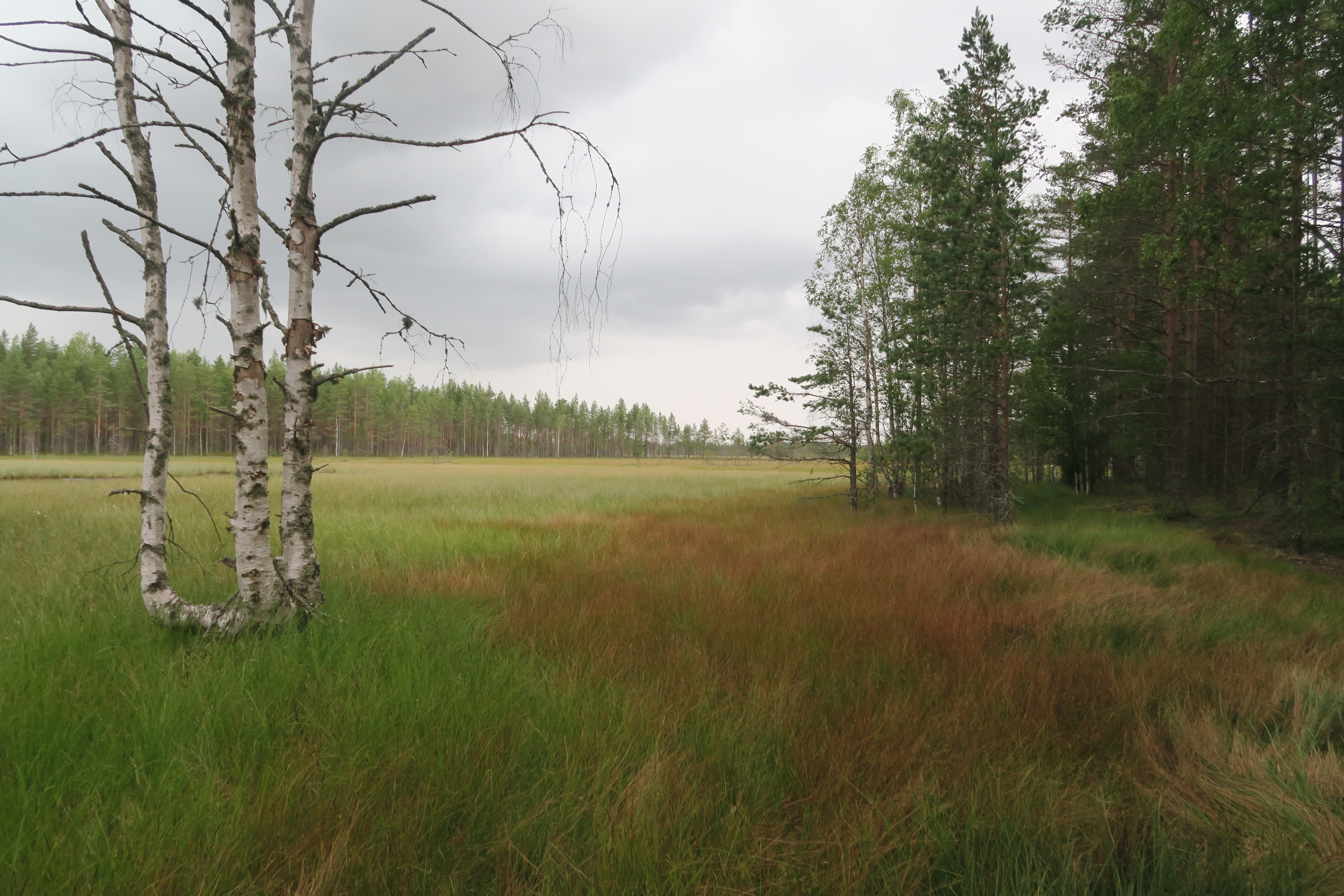 Maantielakso Karviassa, näkymä Laksonevan suuntaan.